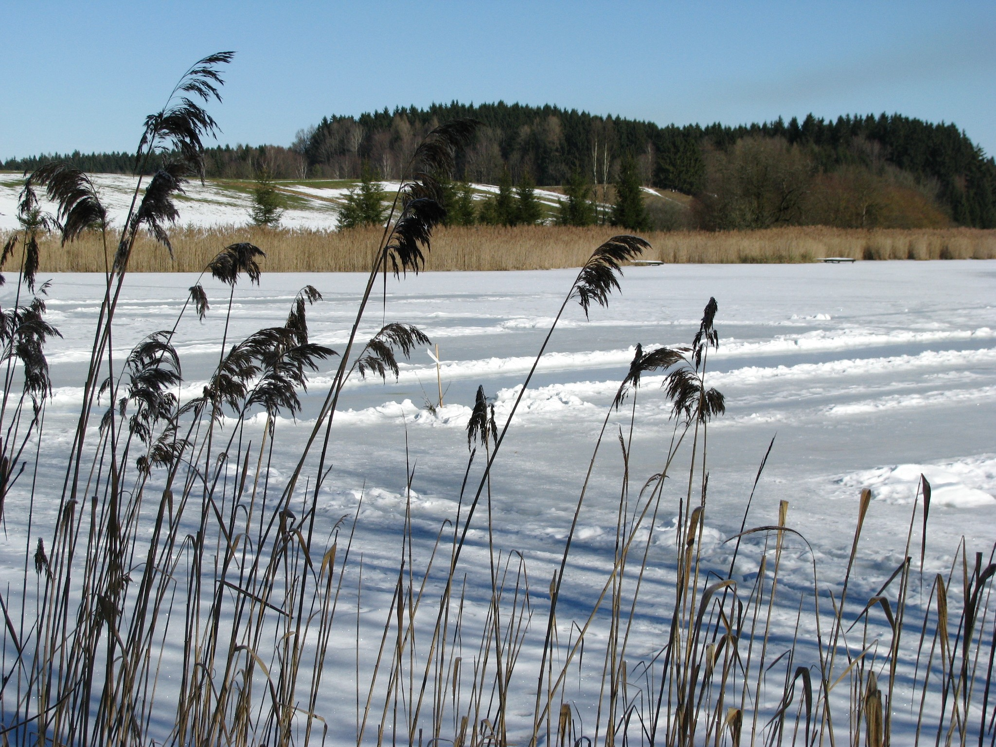 Harmatinger Weiher in der oberbayerischen Gemeinde Egling, mit Eisdecke